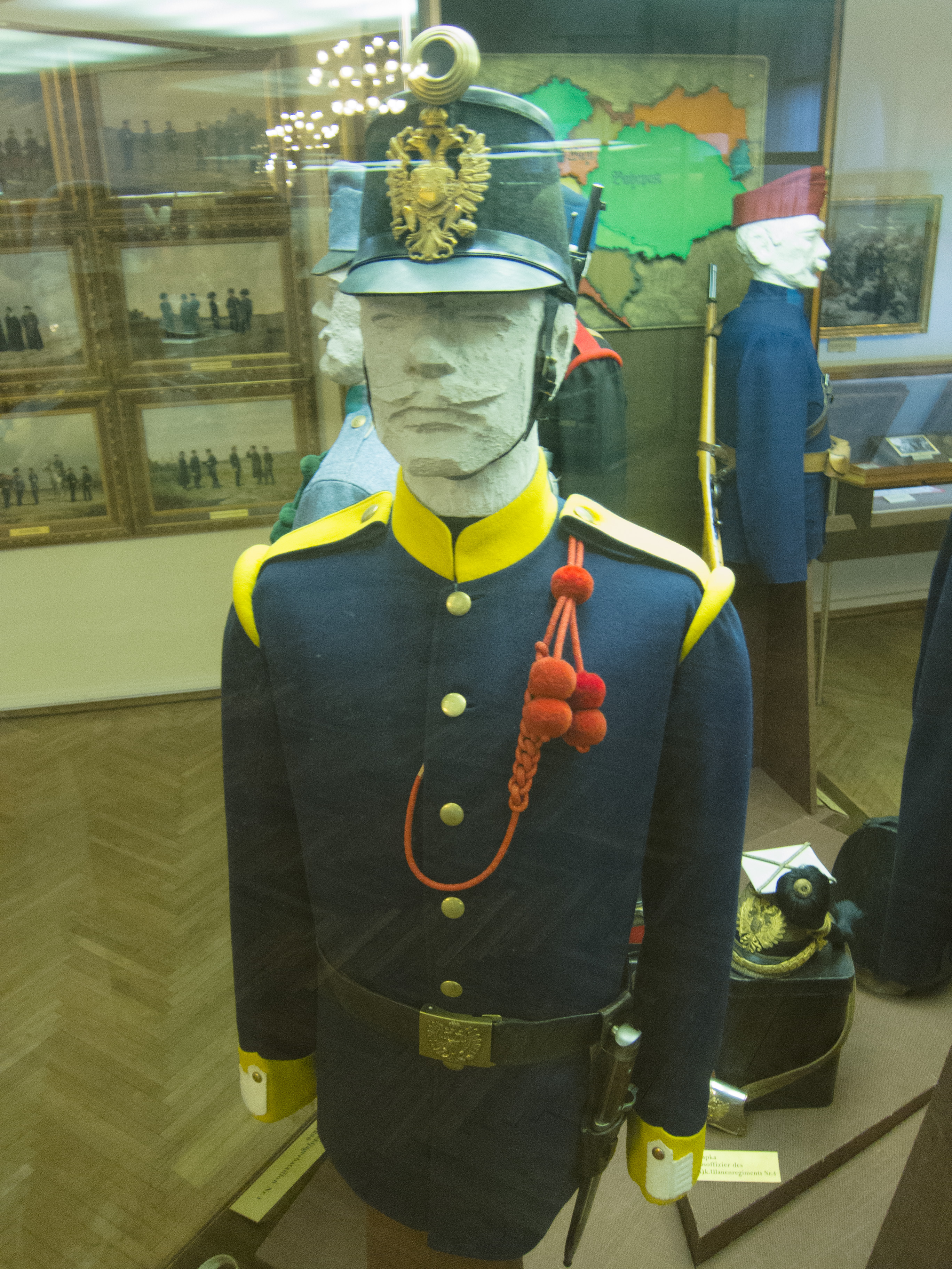 Heeresgeschichtliches Museum - Vienna, Austria, 2013